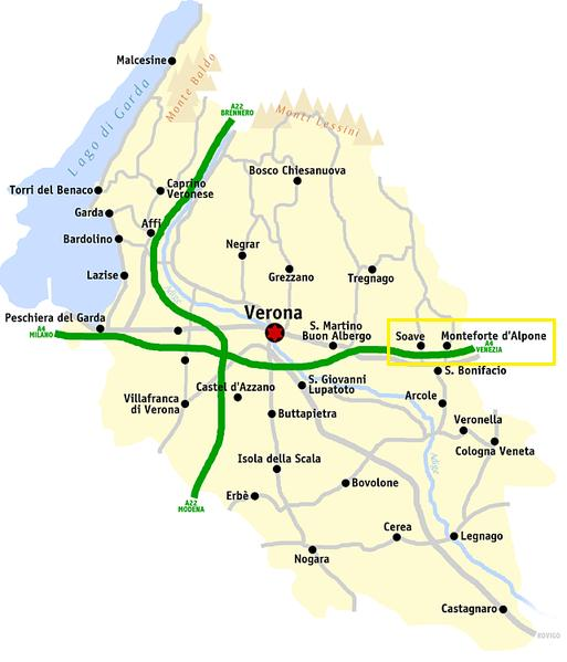 Kaart van de provincie Verona